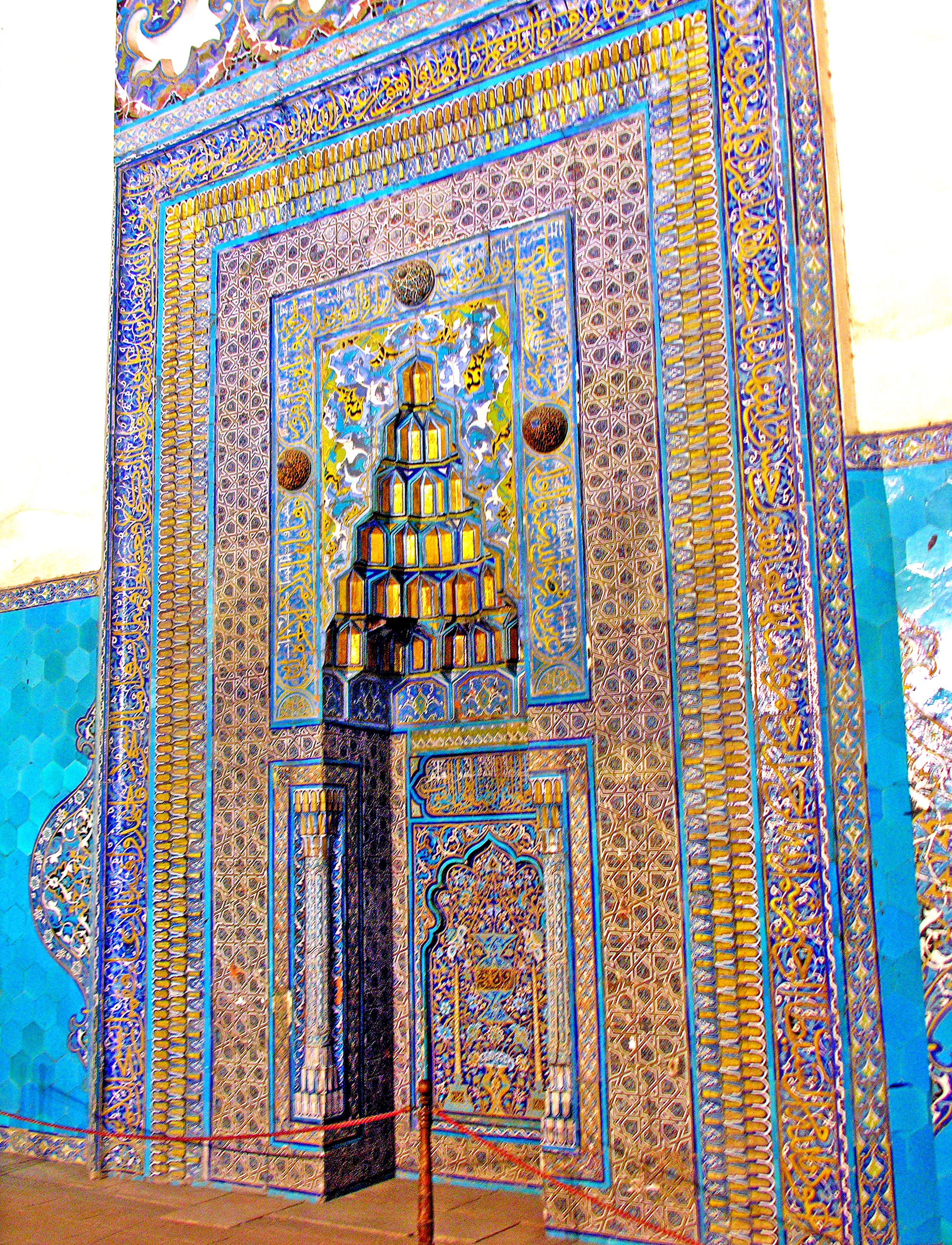 Turkey-1356